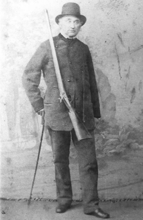 Johann Christian Jauch jun. (1802-1880) (Johann_Christian _Jauch_jun..jpg) auf dem Weg zur Jagd auf dem Gut Wellingsbüttel. Fotograf/Zeichner: unbekannt Datum der Aufnahme: Daguerrotypie um 1850 Andere Versionen: keine --Fifat 00:39, 13. Apr 2005 (CEST)